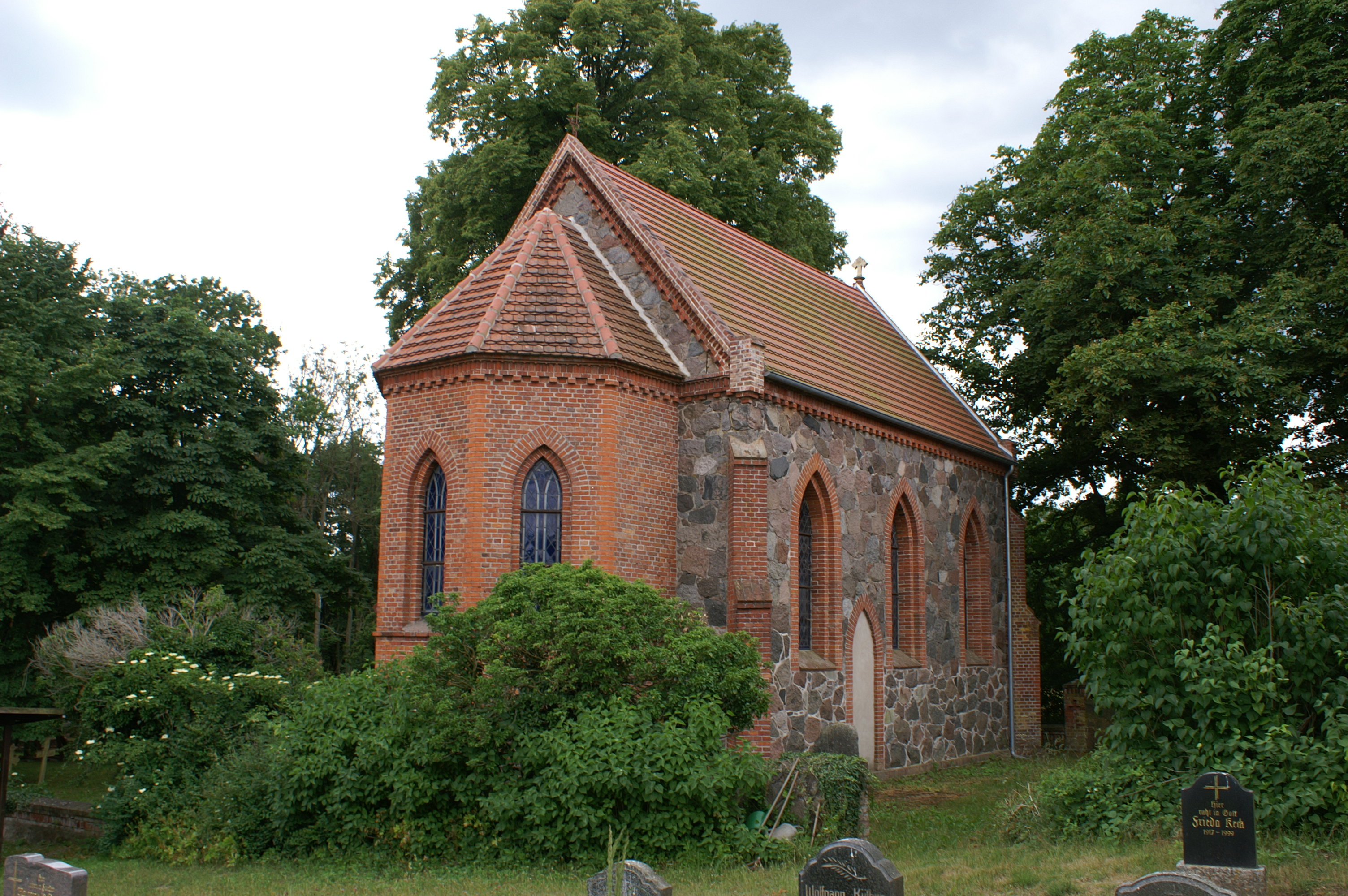 Kirche in Roidin, Ansicht von Nordosten